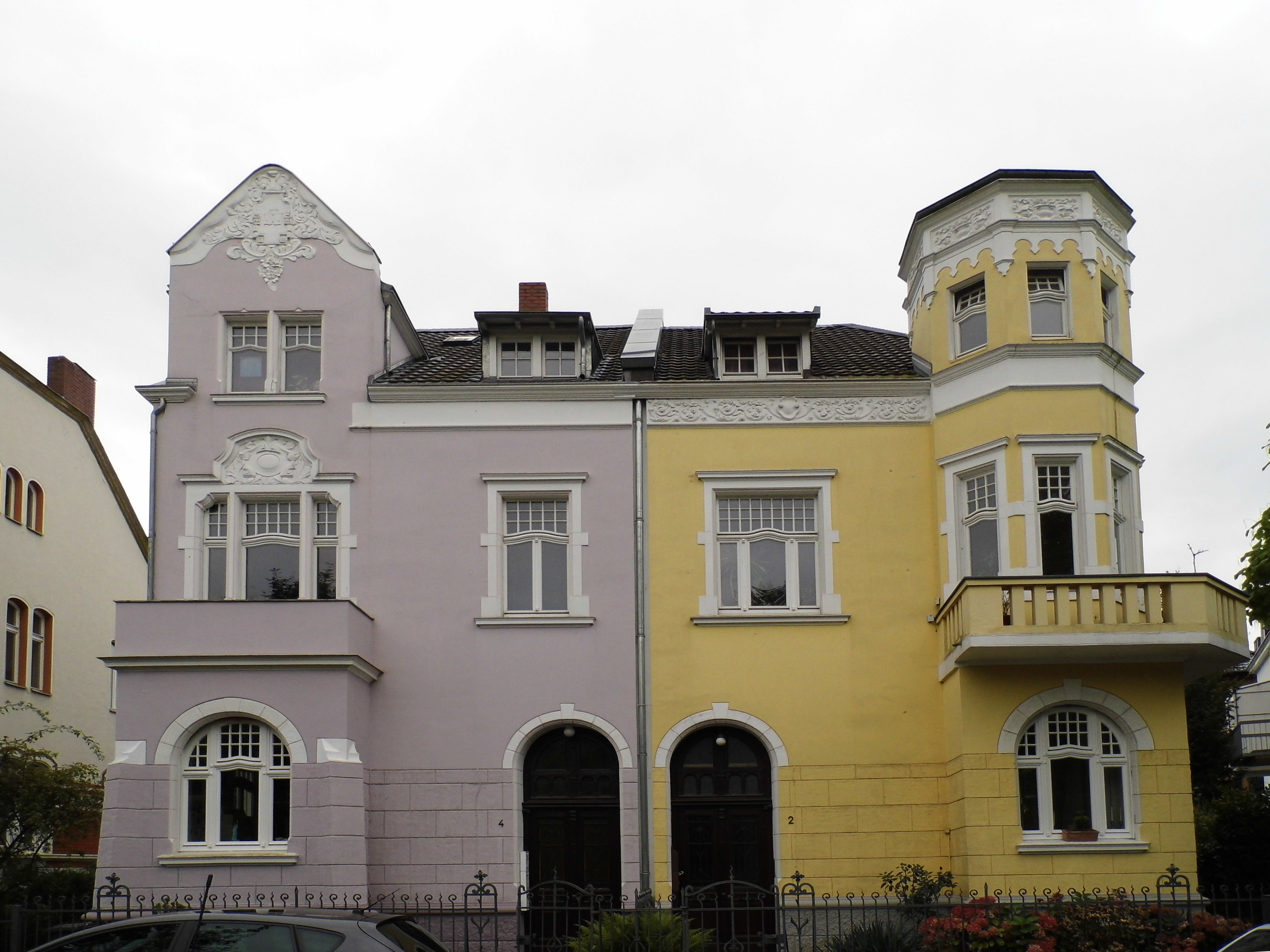 Denkmalgeschützte Doppelvilla Fontanestraße 2/4 in Rüngsdorf, Bad Godesberg